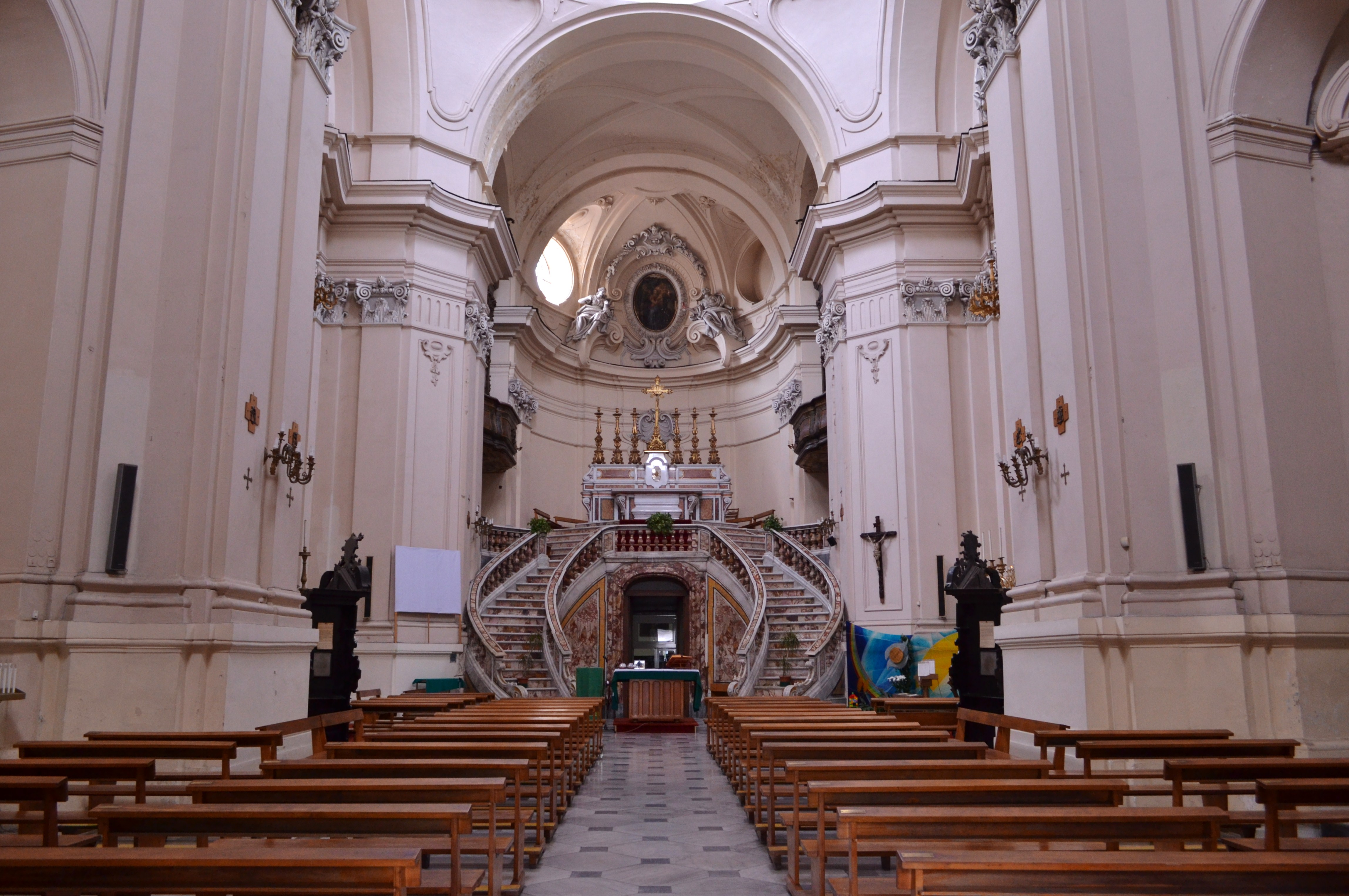 Napoli. Borgo Sant'Antonio Abate.